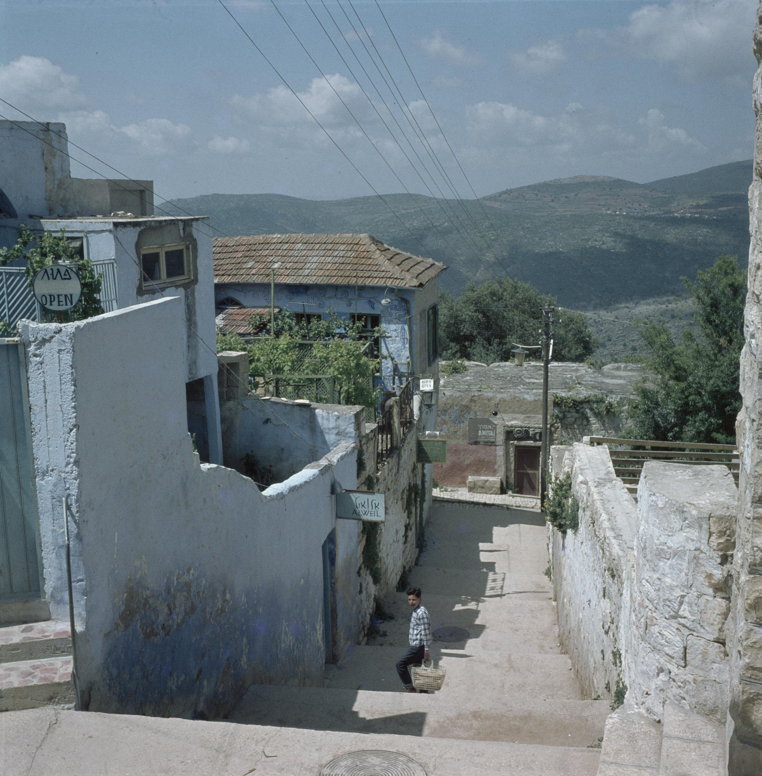 Collectie / Archief : Fotocollectie Van de Poll Reportage / Serie : [ onbekend ] Beschrijving : Safad. Kunstenaarskolonie: straatje met brede trappen met links de ateliers van de kunstenaars Alweil en Merzer en aan het einde van de straat Amitai Datum : ongedateerd Locatie : Israël, Safed Trefwoorden : ateliers, heuvels, kunstenaarskolonies, straatbeelden, trappen, woningen Persoonsnaam : Alweil, Arieh, Amitai, Itzhak, Merzer, Arieh Fotograaf : Poll, Willem van de, [onbekend] Auteursrechthebbende : Nationaal Archief Materiaalsoort : Negatief (zwart/wit) Nummer archiefinventaris : bekijk toegang 2.24.14.02 Bestanddeelnummer : 255-9260